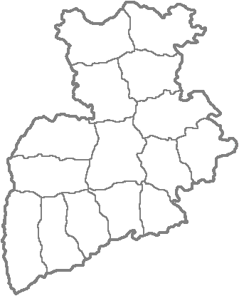 Мапа Чернігівської губернії